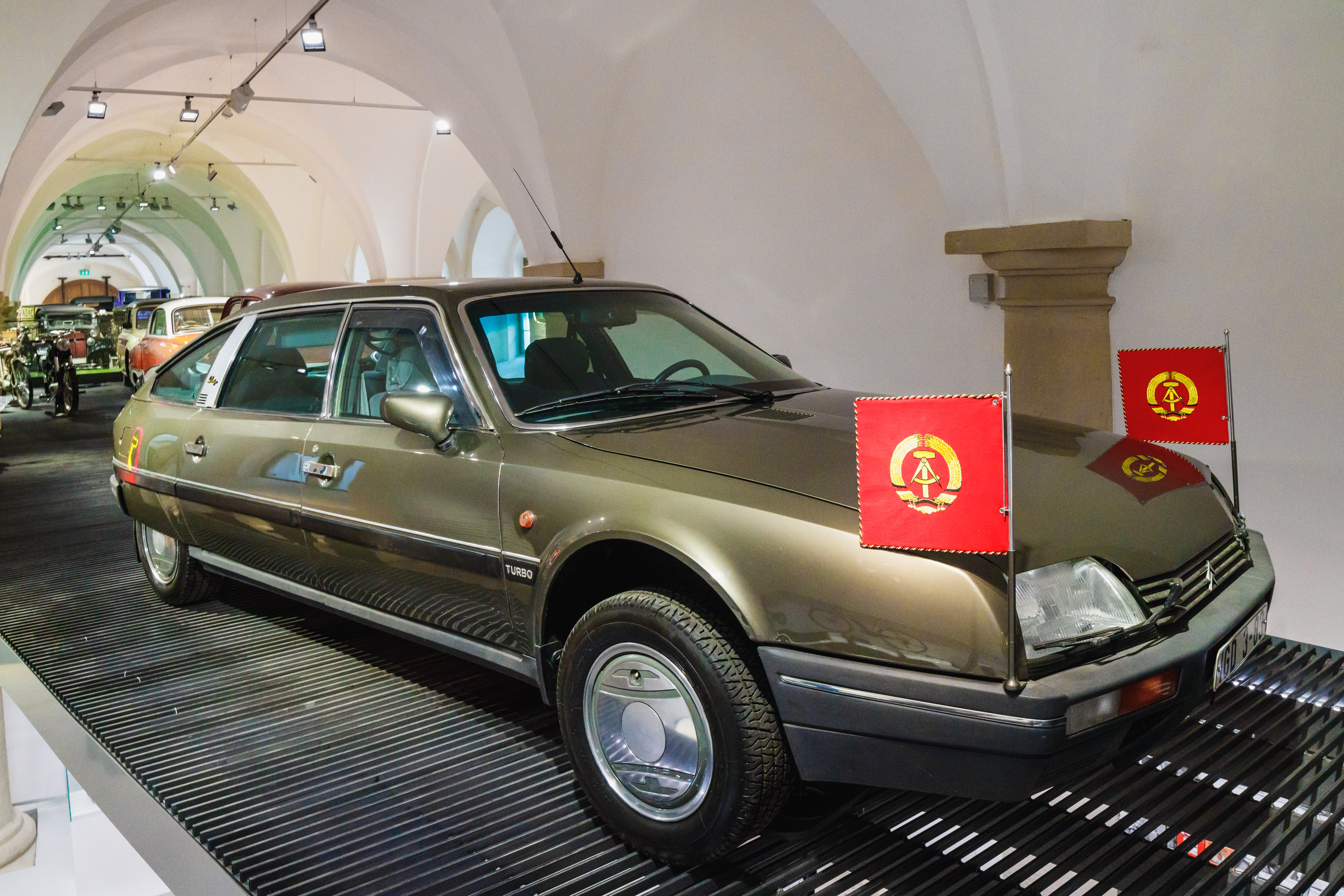 Citroen CX 25 Prestige Turbo 2 (genutzt von Erich Honecker), Verkehrsmuseum Dresden (2)